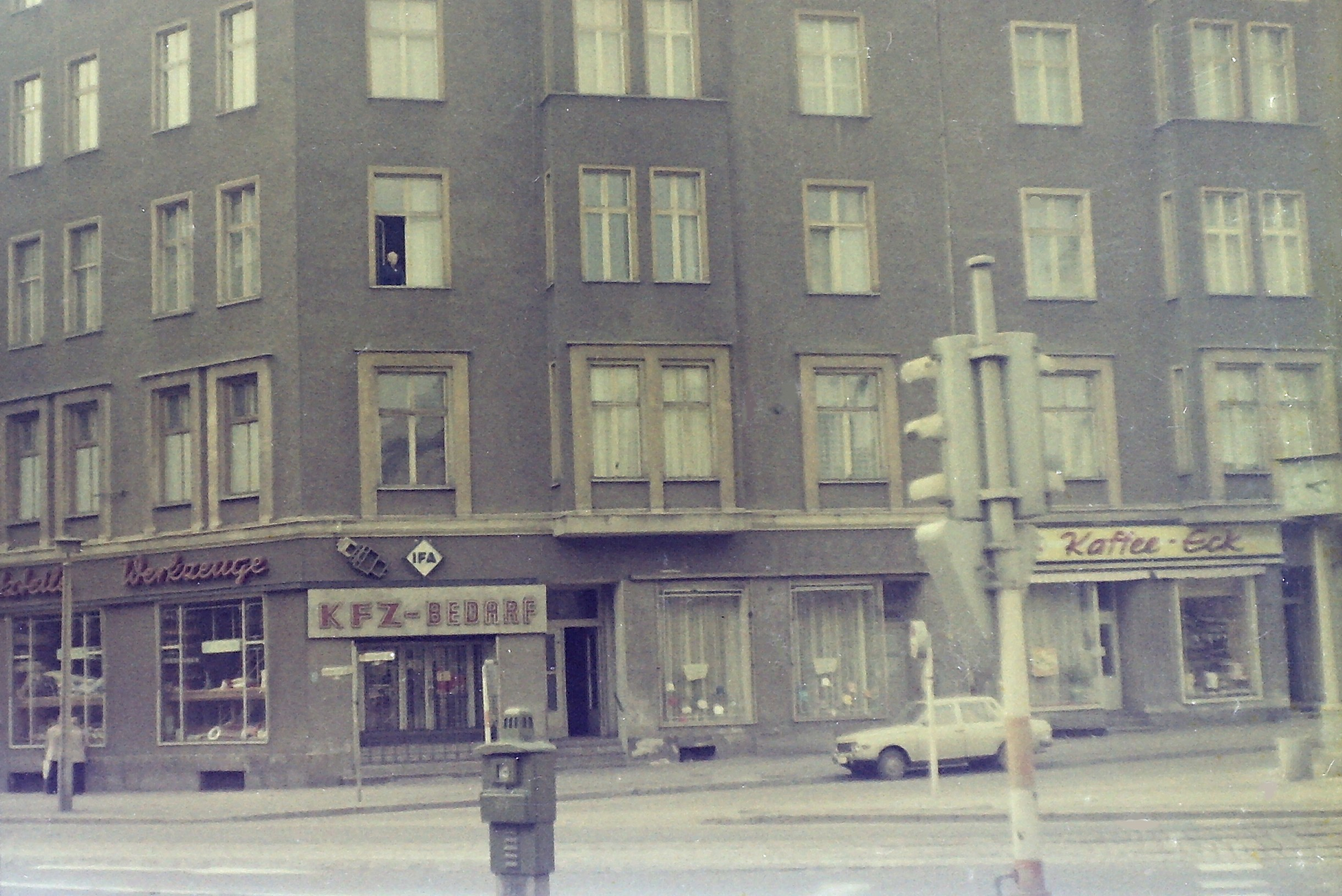 Aufnahme des Hauses Chaussestraße 131 in Berlin am 27.03.1974, in dem Wolf Biermann die nach dem Haus benannte Schallplatte aufnahm.